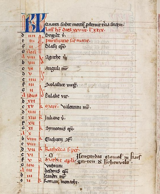 Kalenderblatt "Februar" aus dem Codex Liechtenthal 37, aus dem Wormser Kloster Kirschgarten, von der Nonne Anna von Bolanden (+ 1320) stammend, mit Vermerk über eine in Kirschgarten verstorbene Nonne aus dem Geschlecht Bolanden-Hohenfels. Beim Monatsnamen steht fehlerhaft Ian.